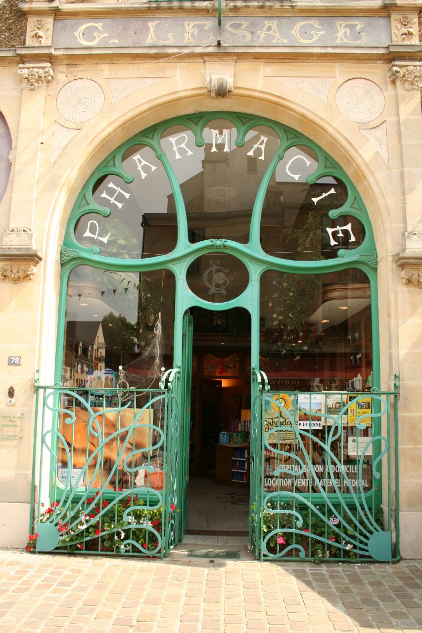 Pharmacie Lesage à Douvres-la-Délivrande dans le Calvados (Basse-Normandie, France).